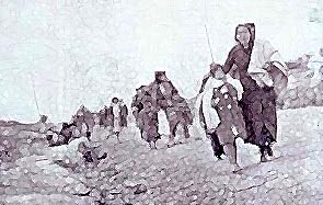 Representación artística de un grupo de refugiados republicanos durante su huida hacia Almería, el 8 de febrero de 1937